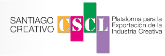 Logo do Snatiago Creativo